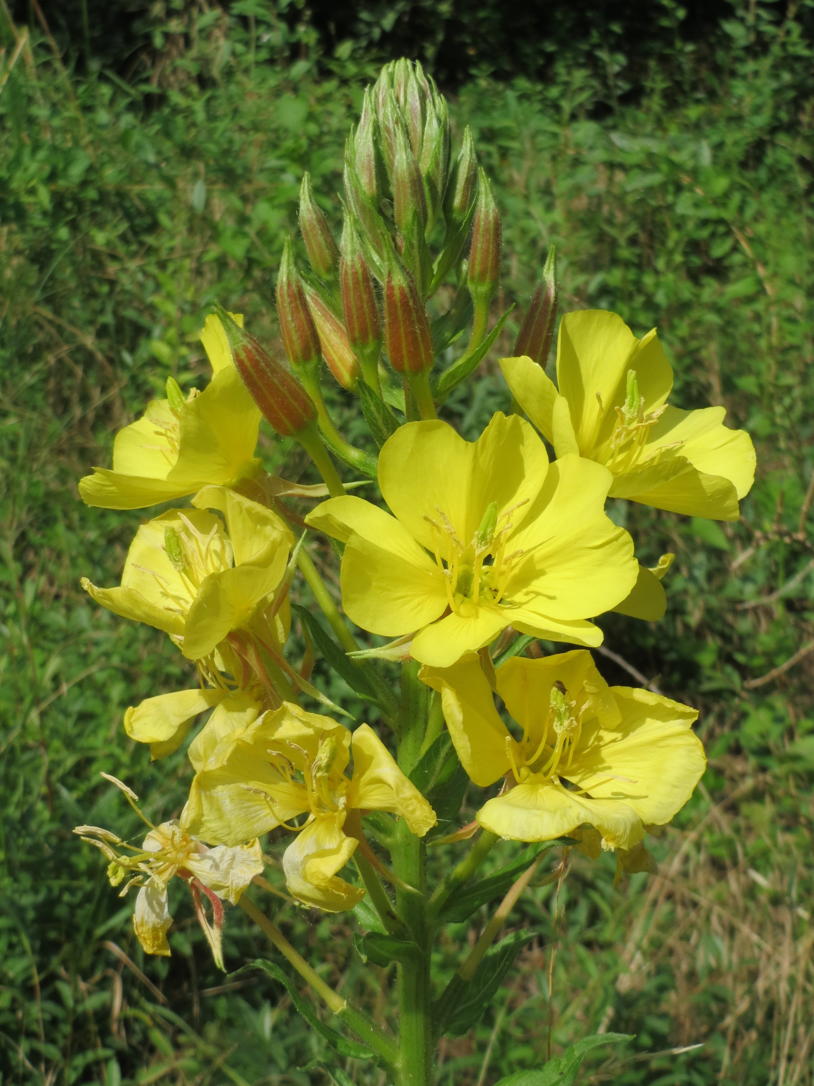 Gemeine Nachtkerze (Oenothera biennis) in Hockenheim